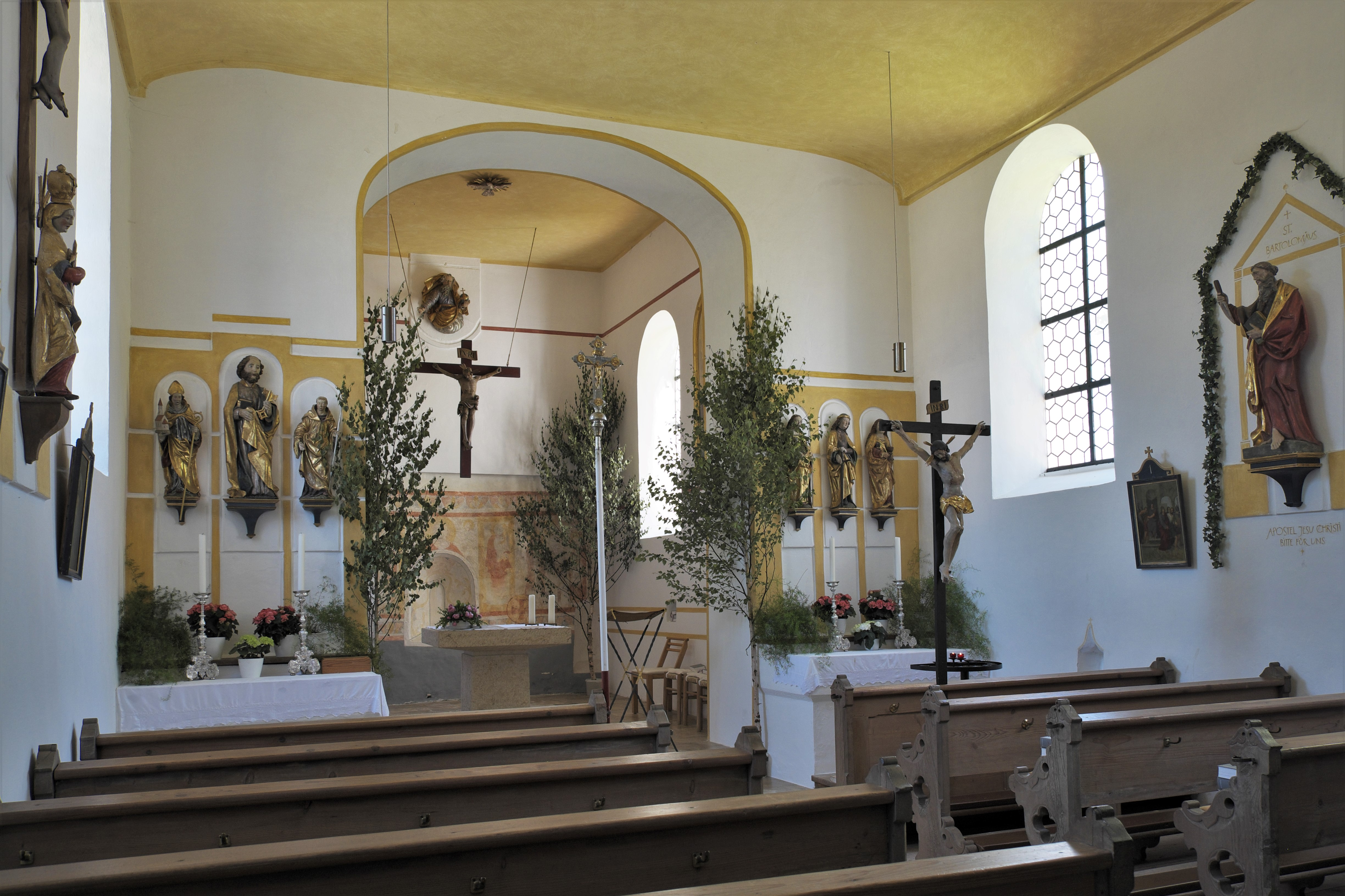 Katholische Filialkirche St. Bartholomäus in Maising (Pöcking) im Landkreis Starnberg (Bayern, Deutschland), Innenraum